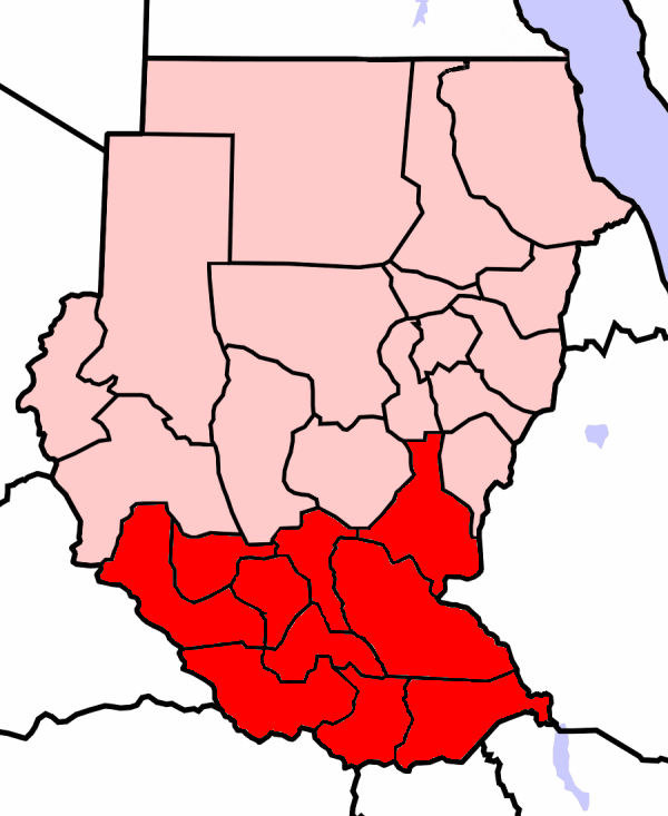 خريطة السودان وجنوب السودان.